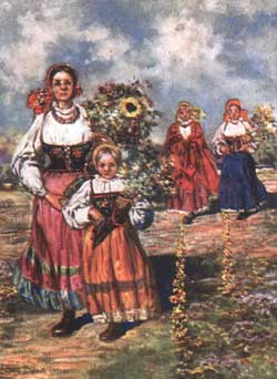 Народные обычаи праздника "Божье тело". Польская открытка начала XX в.